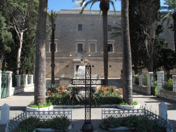 מרכז הצליינים בסטלה מאריס,חיפה